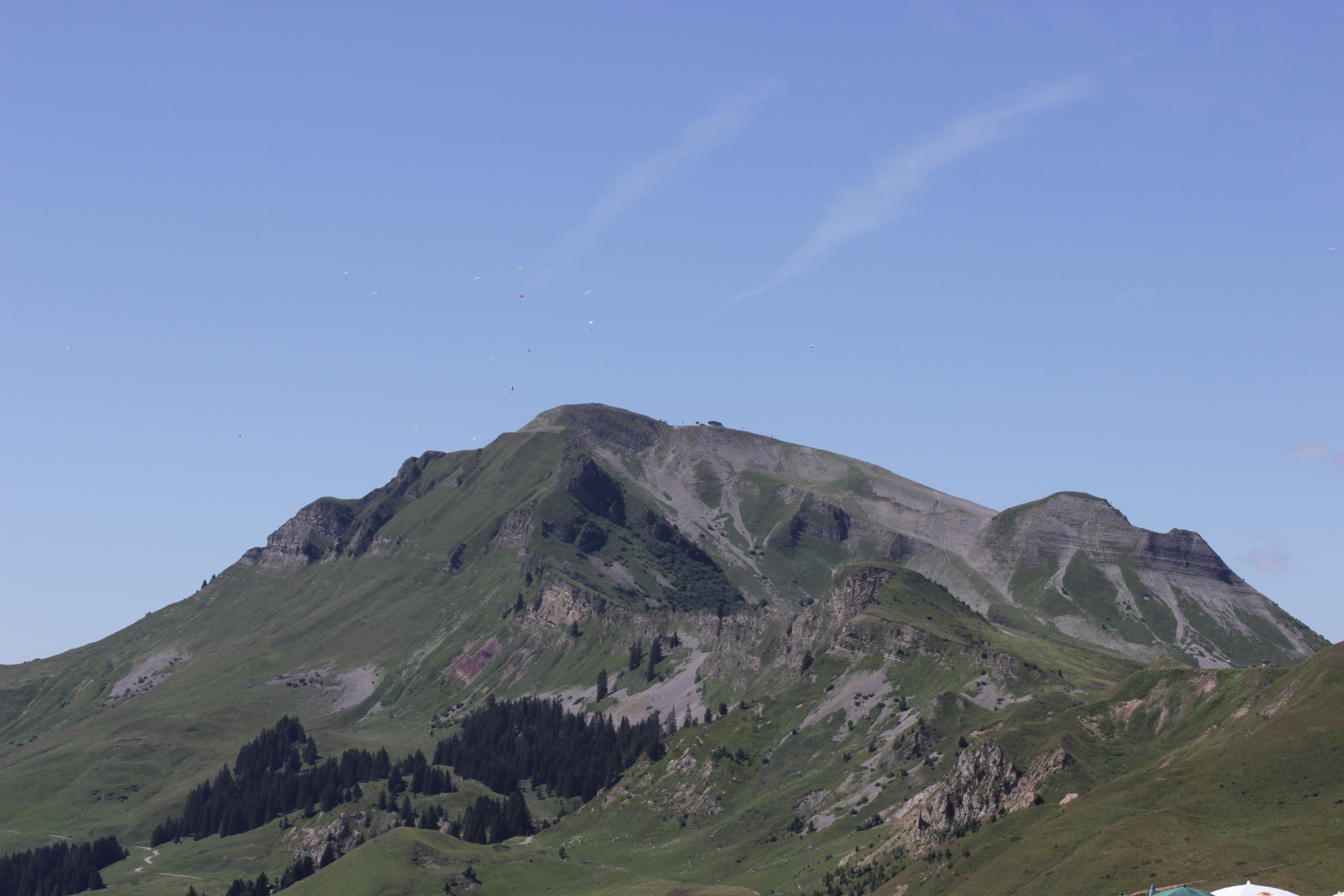 Mont Lachat de Châtillon (Le Grand-Bornand, France)